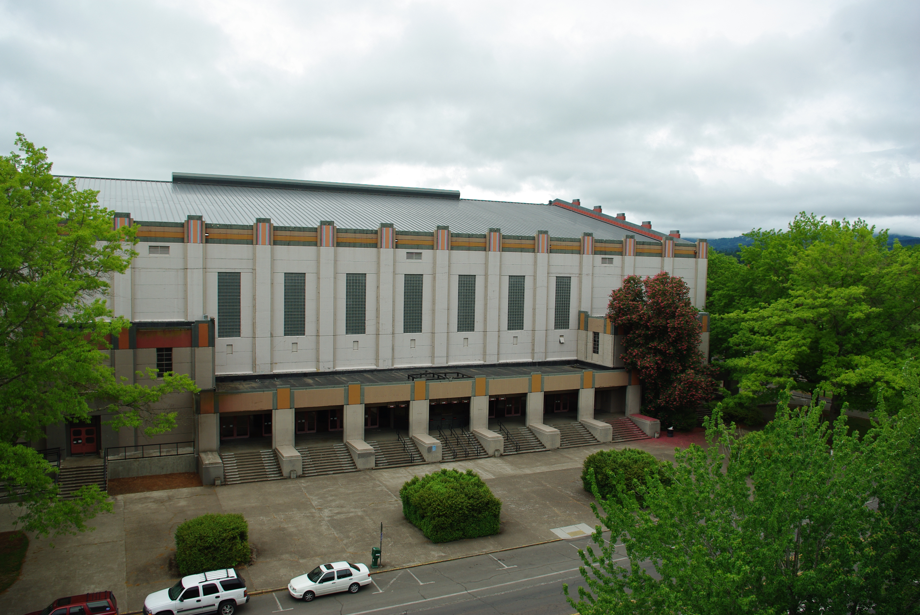 Gill Coliseum